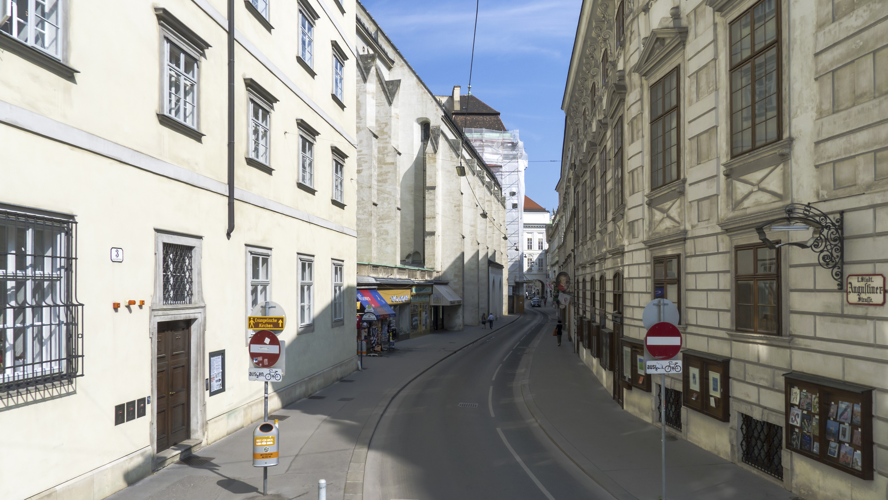 Augustinerstraße in Wien 1 bei Nr. 3 Richtung Norden